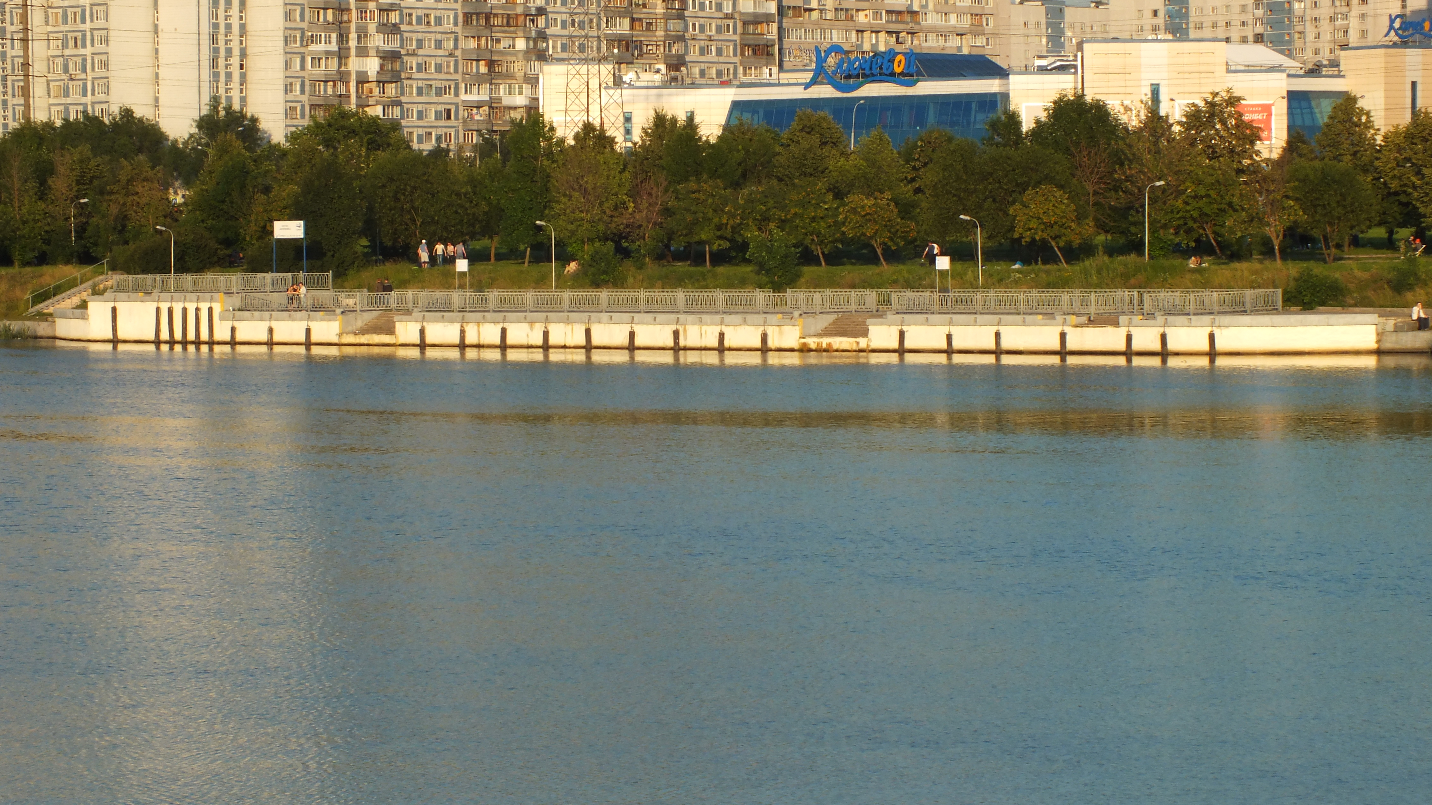 Причал «Братеево» на Москве-реке. Москва, улица Борисовские Пруды.